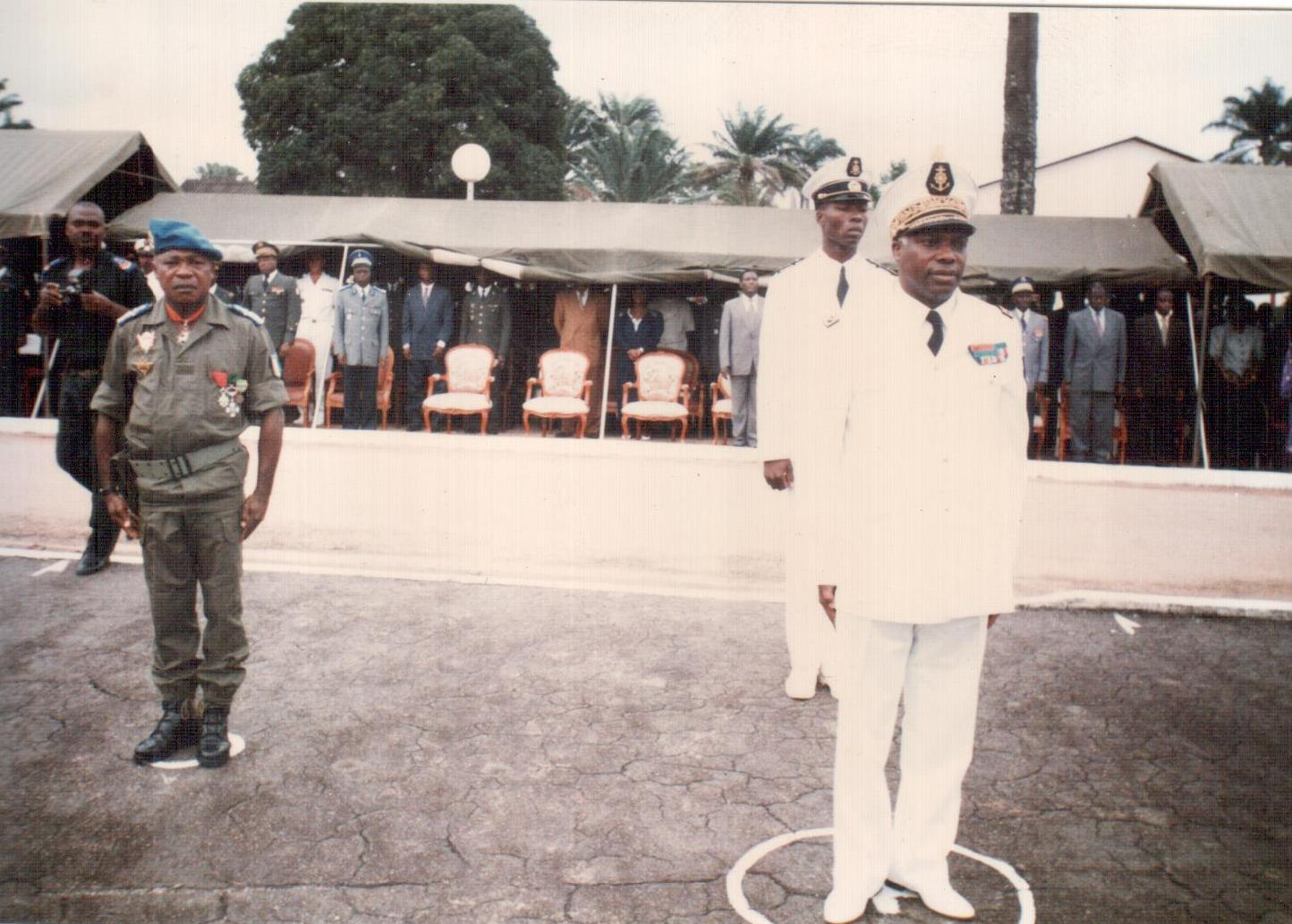 Prise d'arme